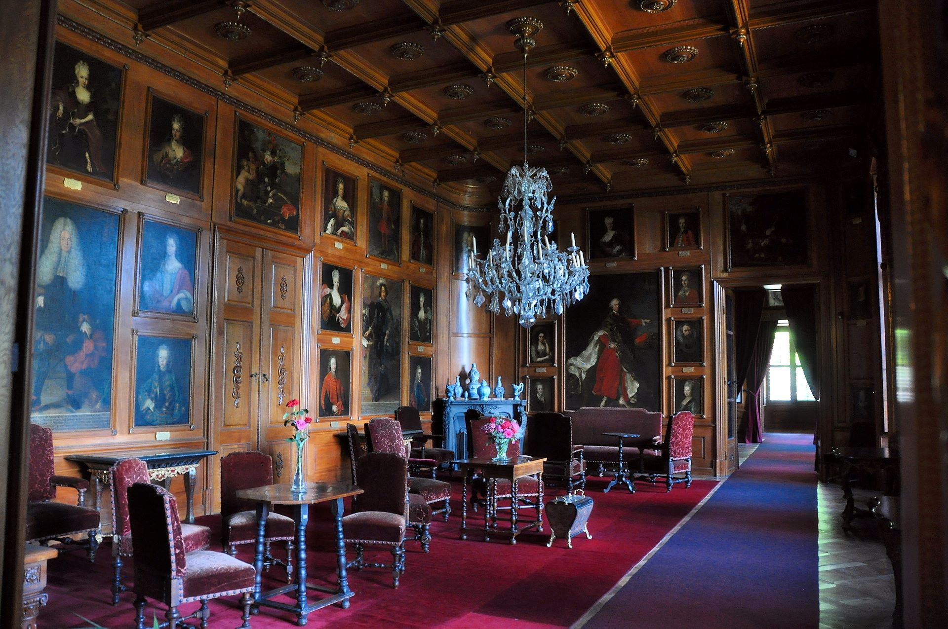 Schloss Rajec nad Svitavou